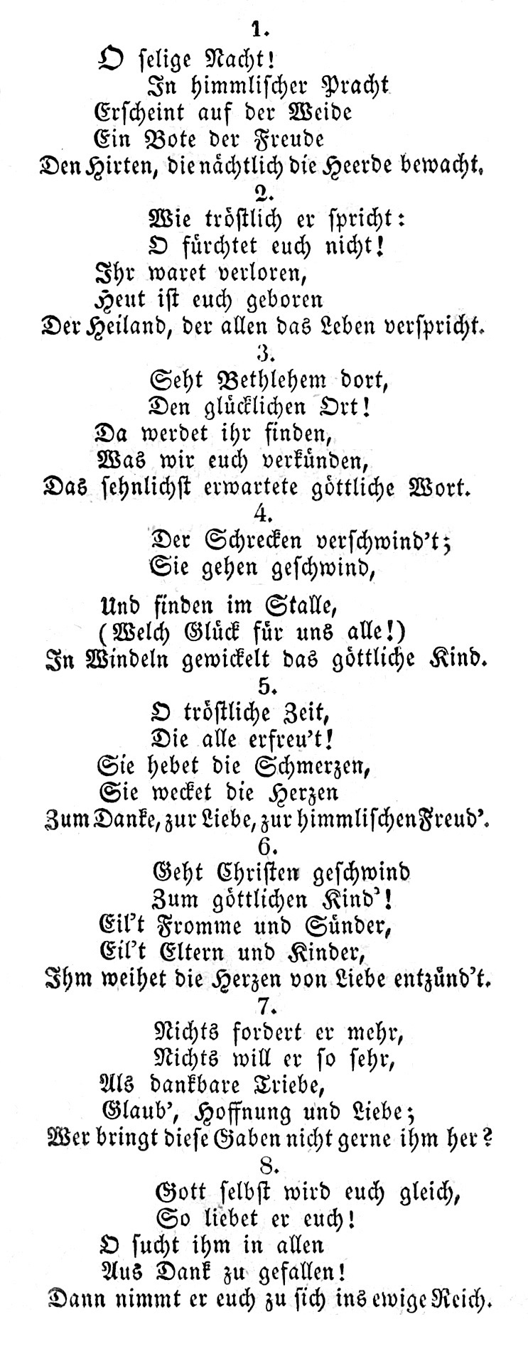 Christoph Bernhard Verspoell: O selige Nacht, Druckfassung 1829